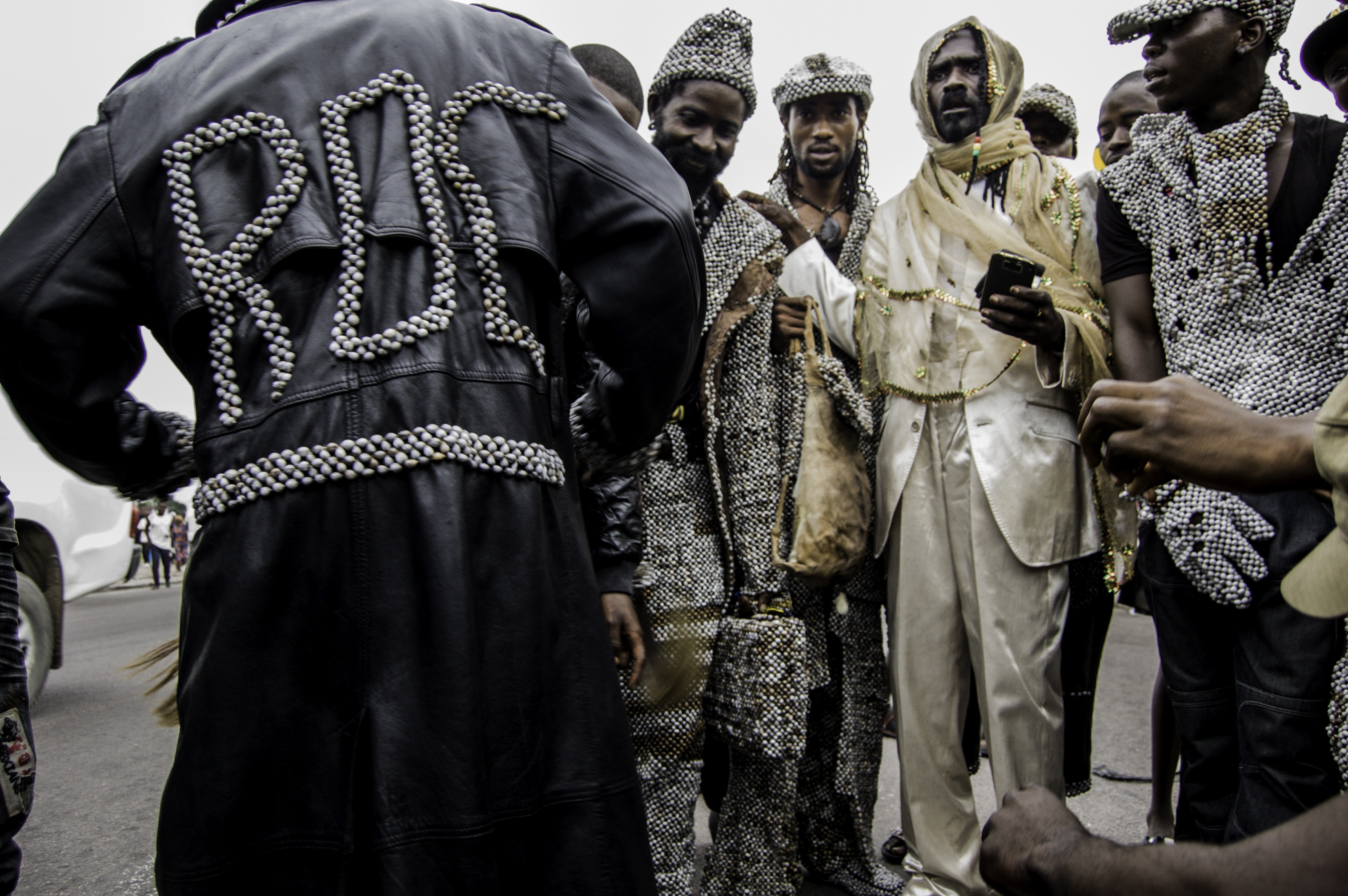 des sapeurs traditionnels,habillets en style de perle et combine motif moderne du cuire à la tradition This is an image of Cultural Fashion or Adornment from Democratic Republic of the Congo